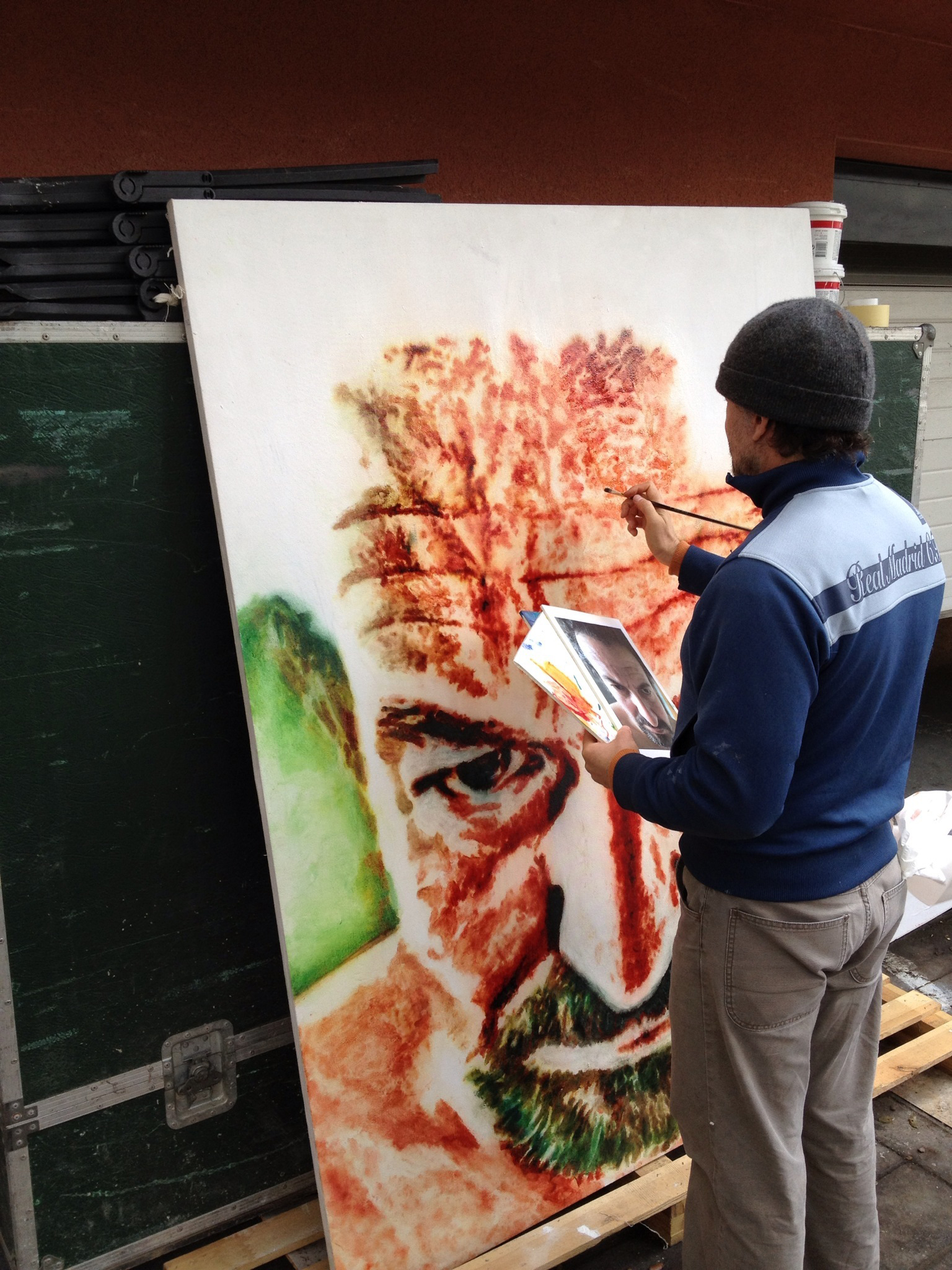 JMC Pintando Blood Test